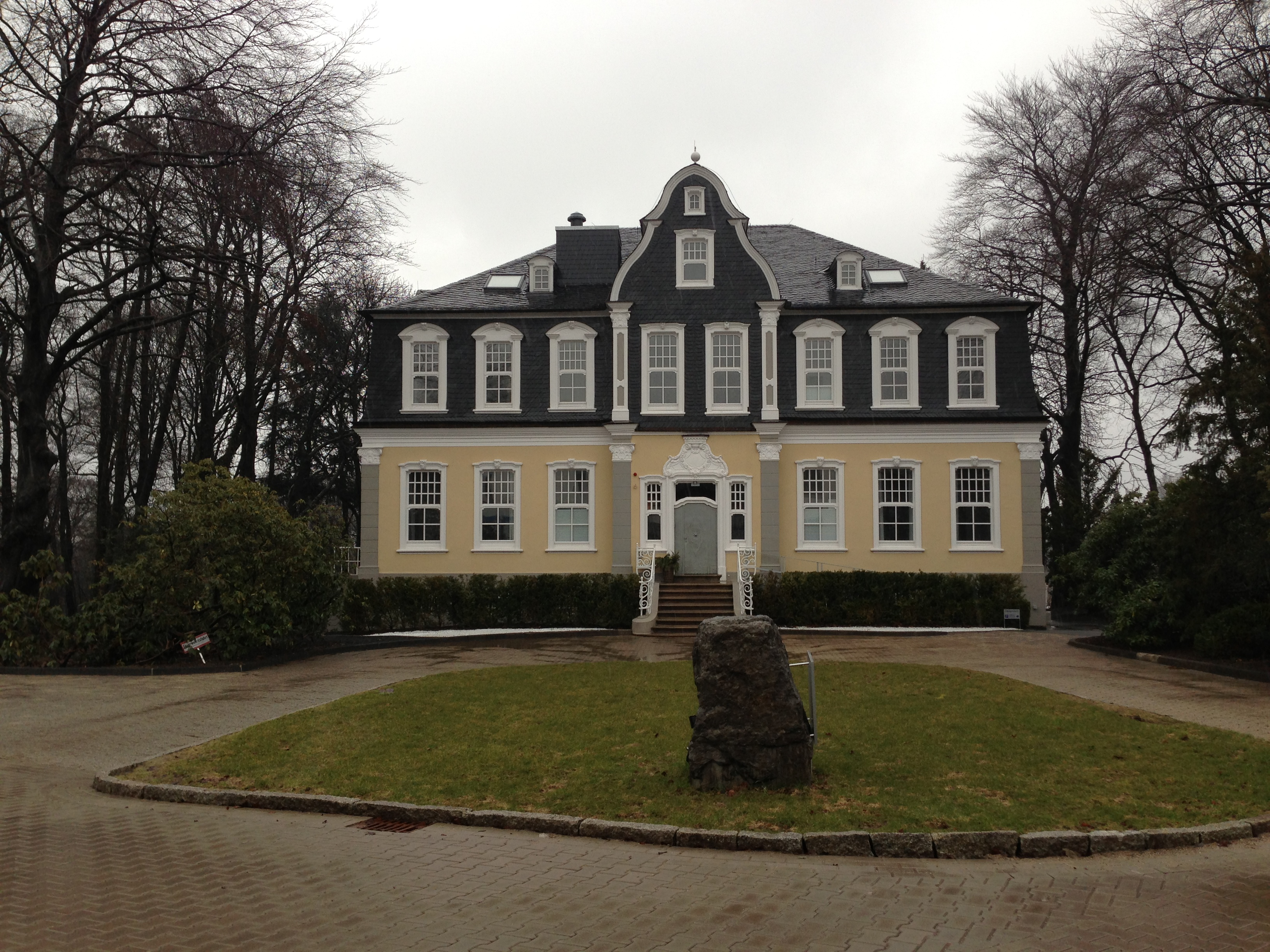 Parkhotel in Wuppertal-Ronsdorf